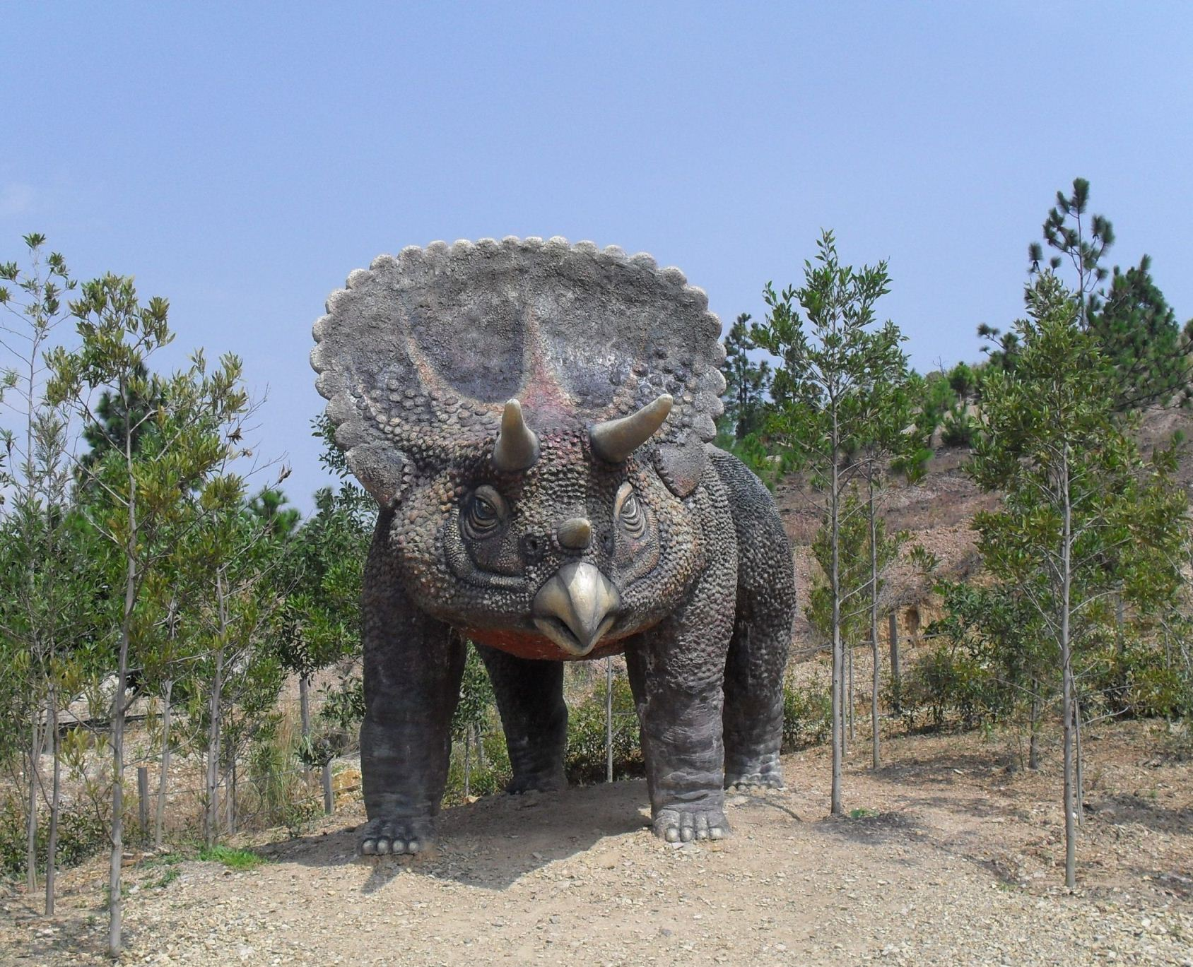 Reproducción de triceratops en el parque temático Gondava, en el departamento de Boyacá Colombia